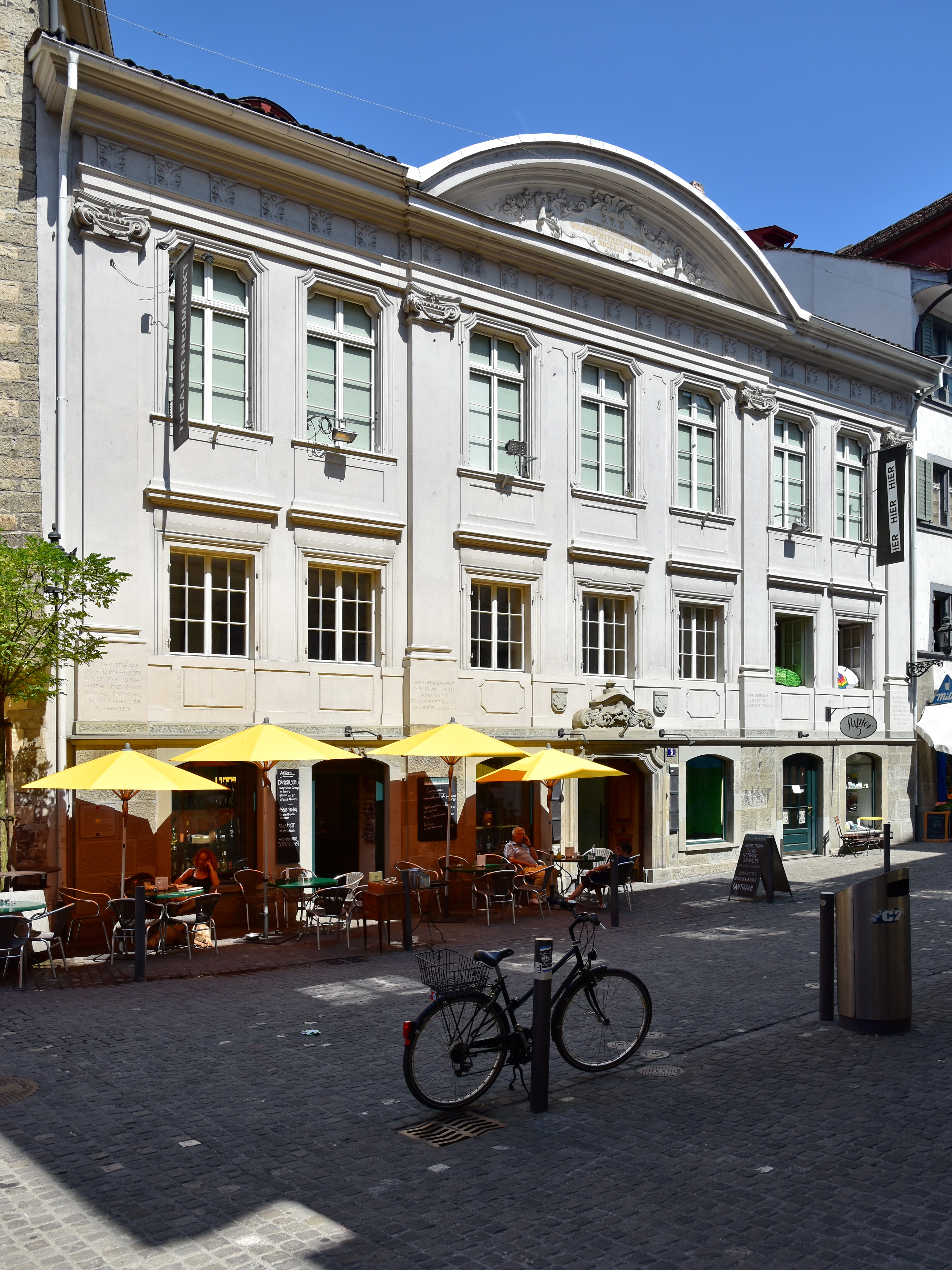 Theater Neumarkt, Neumarkt in Zürich (Switzerland)